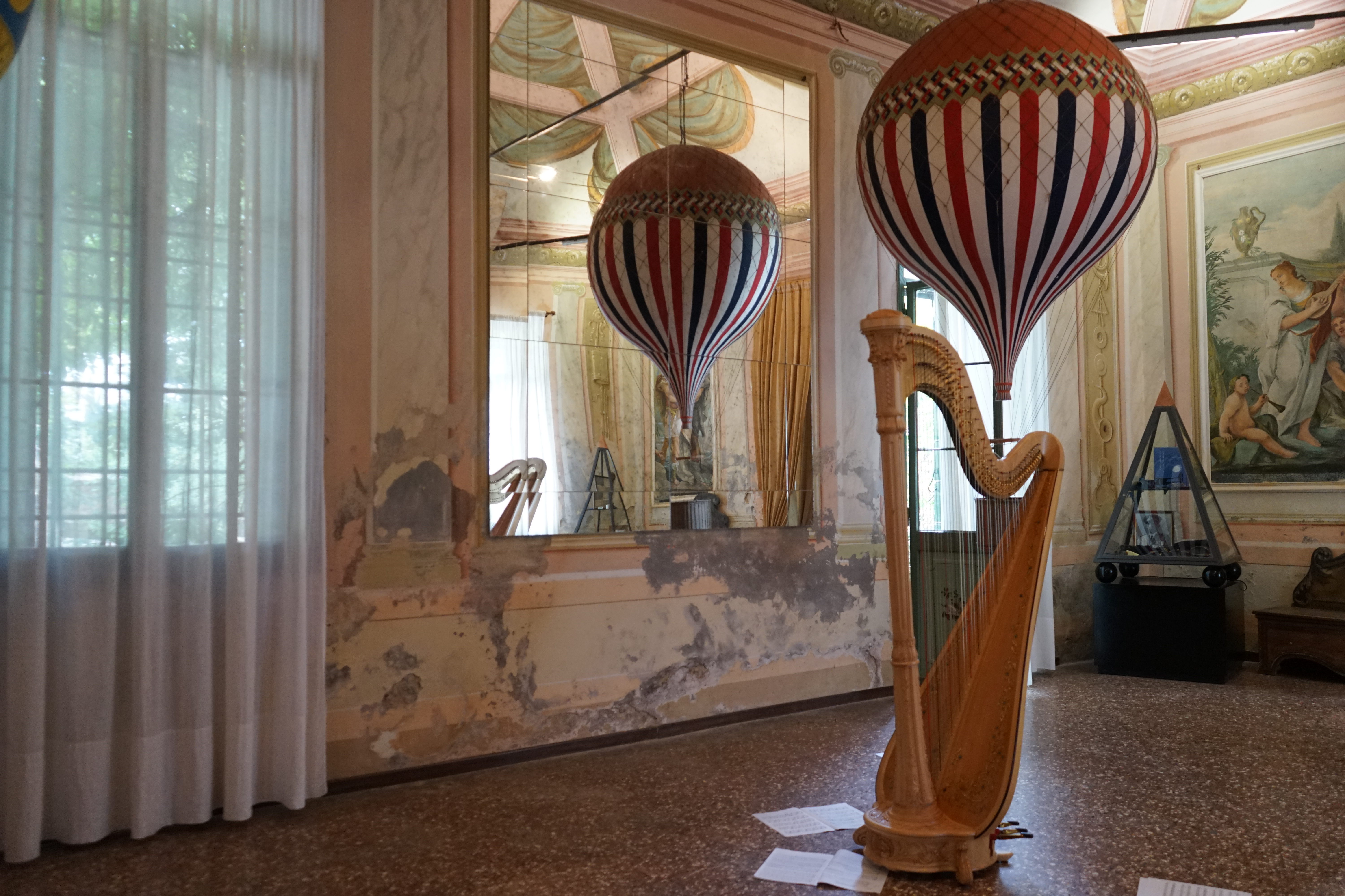 Palazzo Zaborra